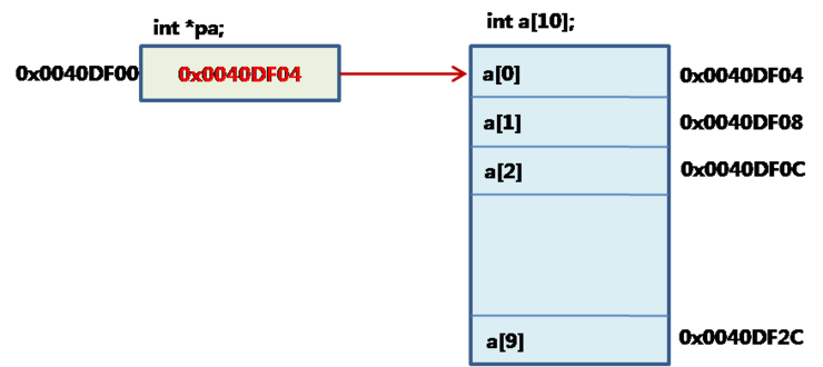 C언어 정수형 포인터 구조